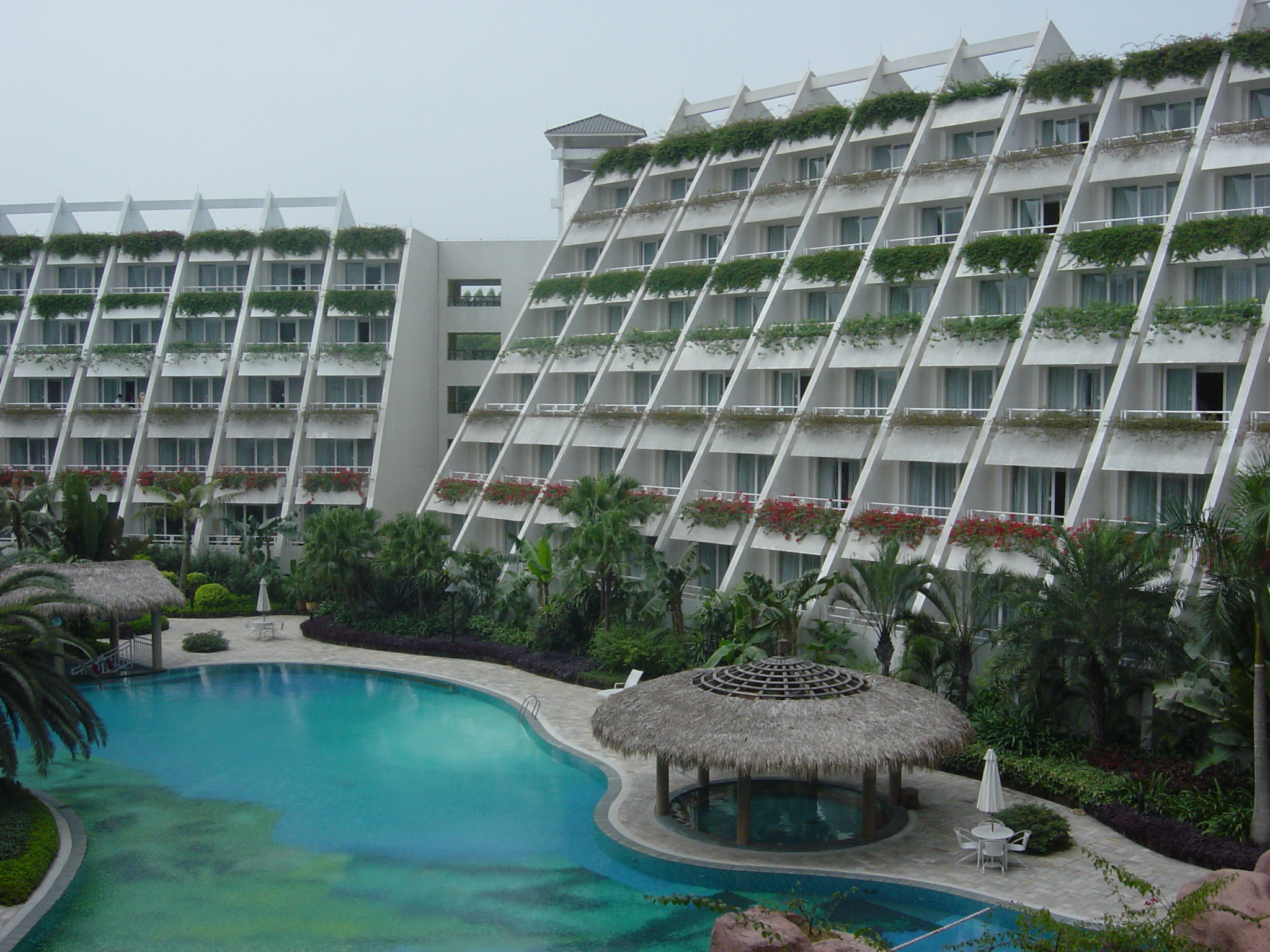 长隆酒店内花园泳池一景，本图片由上载者老火豆沙煲于2004年11月9日拍摄。